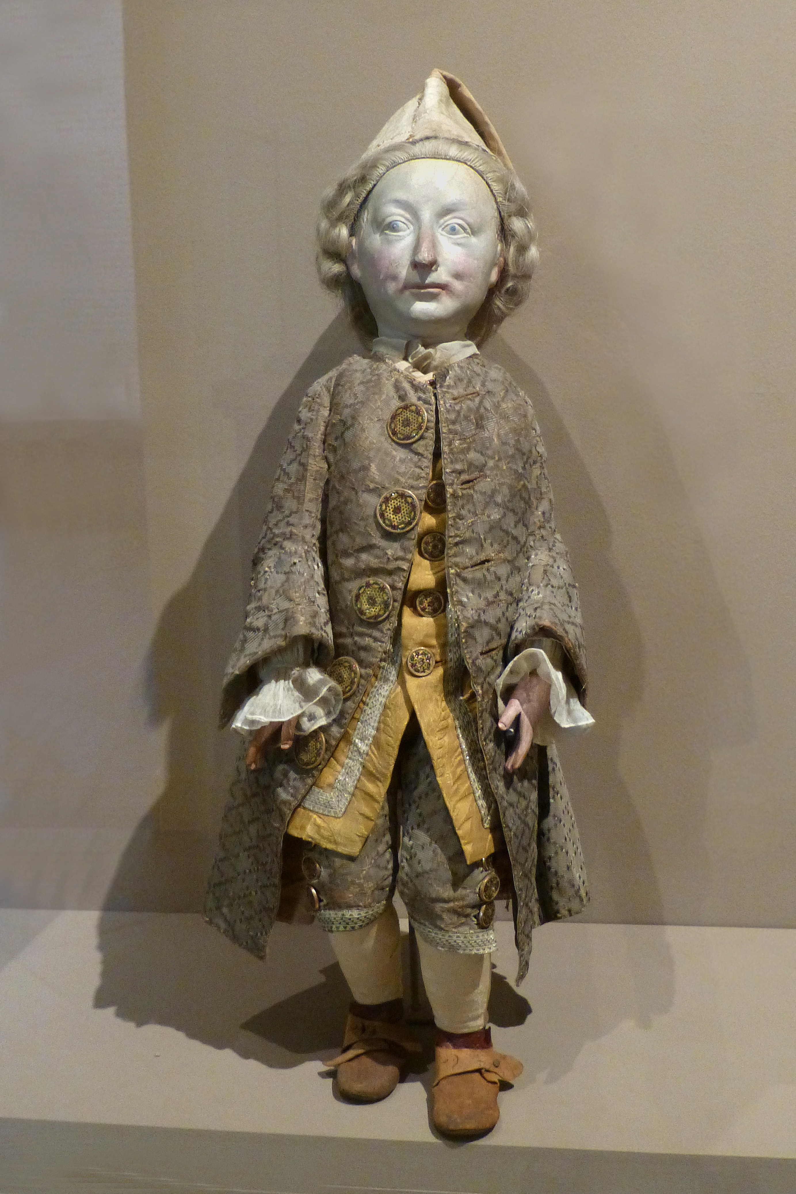 Mannequin représentant Bébé. 2e moitié du XVIIIe et XIXe siècle. Tête de plâtre, perruque en cheveux. La tête a été moulée sur celle de cire conservée jadis, avec le squelette de Bébé, au Muséum de Paris. Les vêtements sont issus de sa garde-robe. Musée Lorrain